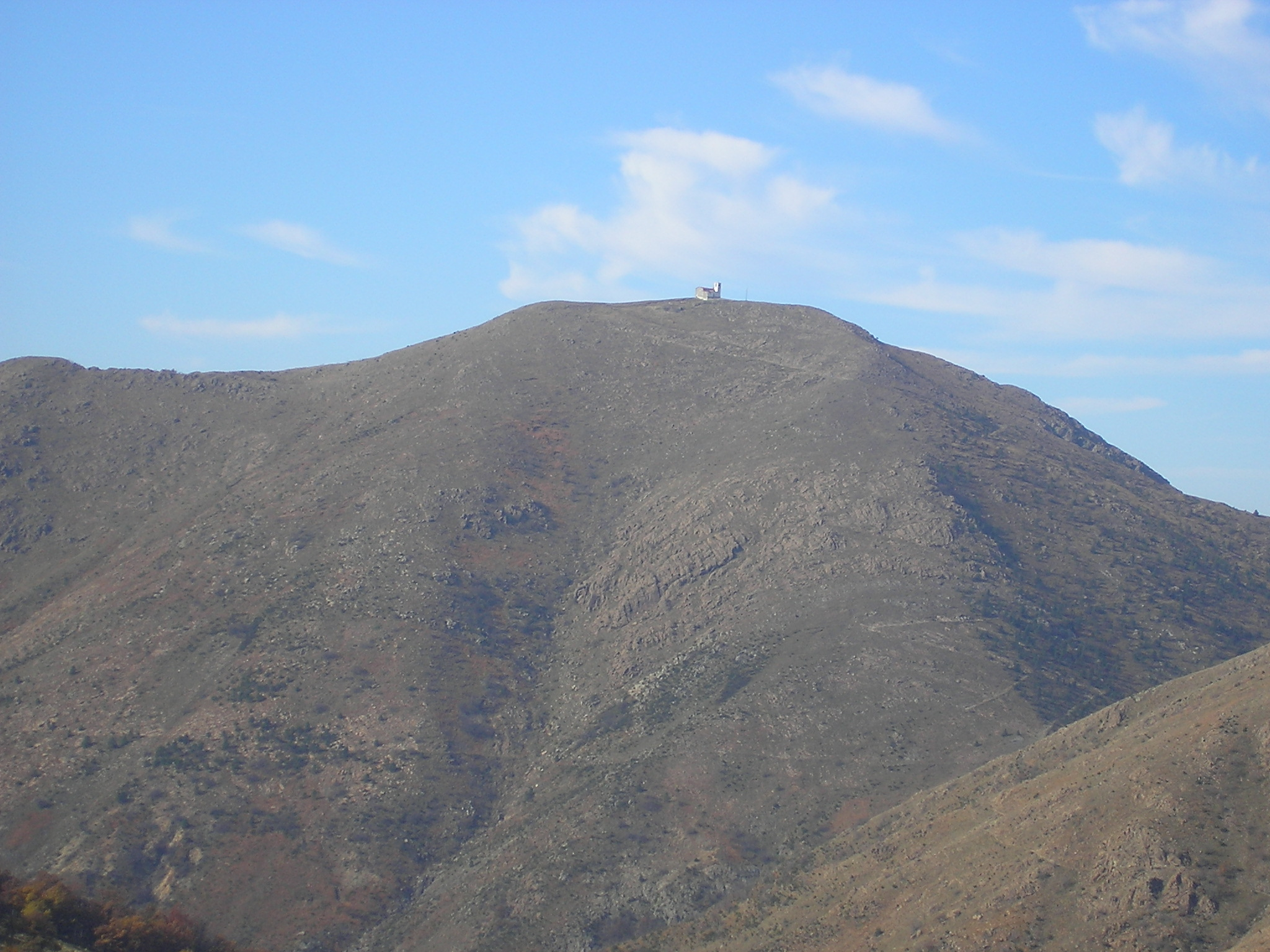 Fonte Propria_Monte Tobbio